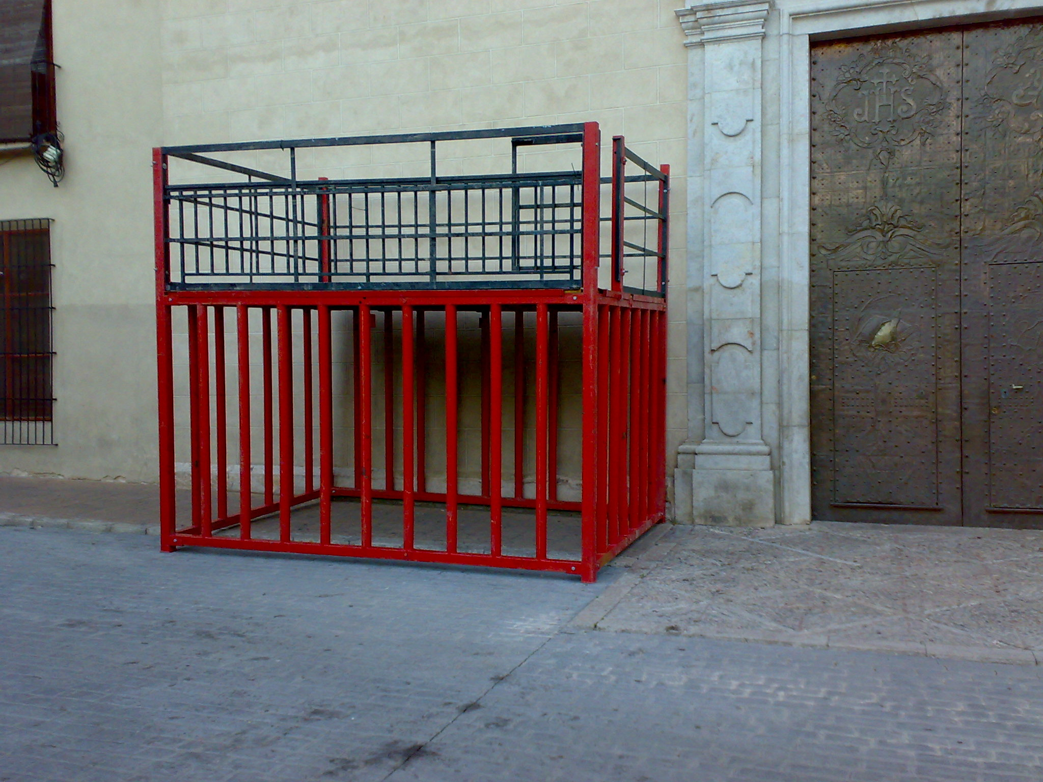 Defensas preparadas en el Carrer Major de Godella para los Bous al carrer de 2010